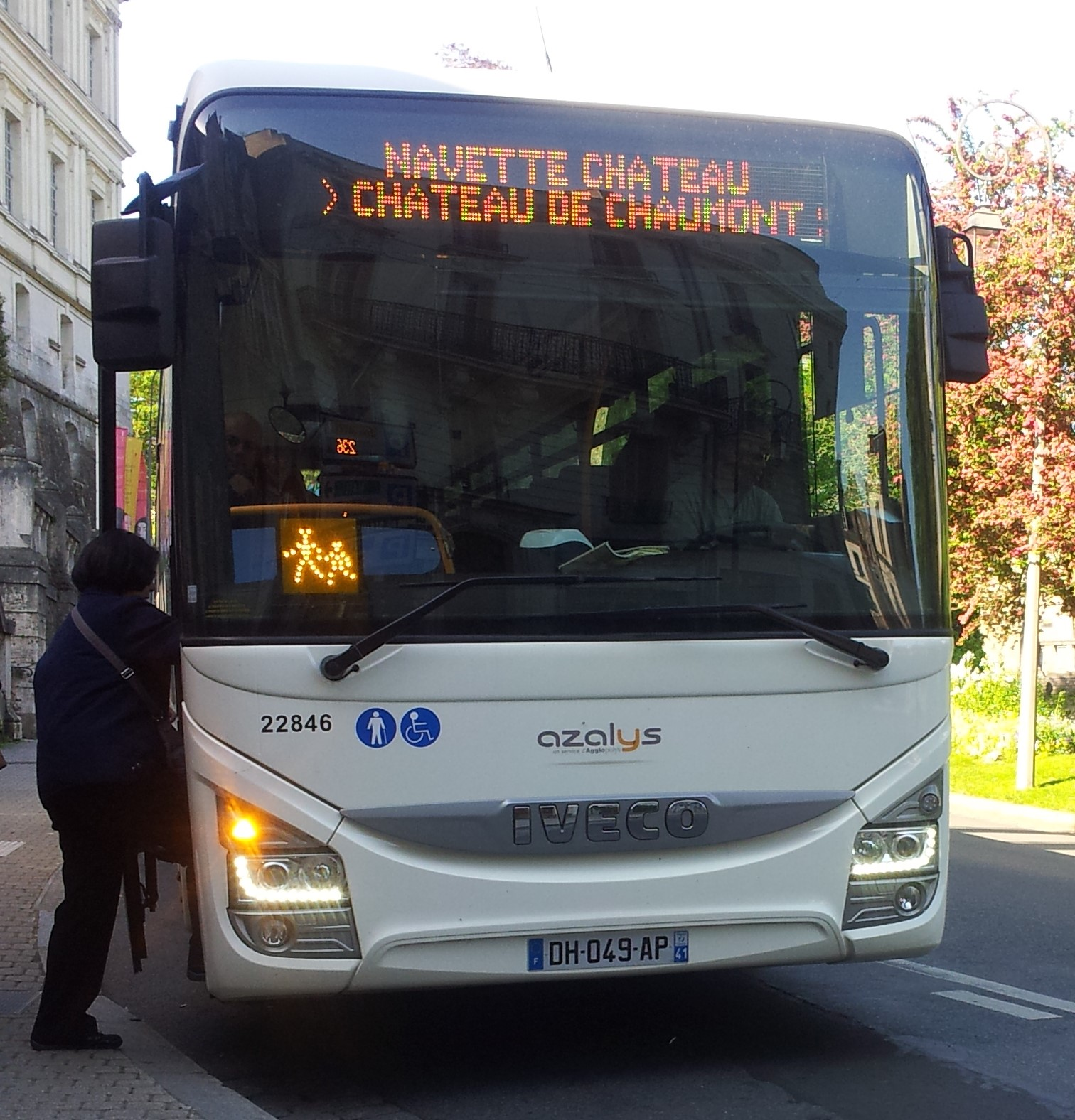 Navette Iveco Bus Crossway N°22846 du réseau Azalys en arrêt au Château de Blois et à destination du Château de Chaumont/Loire